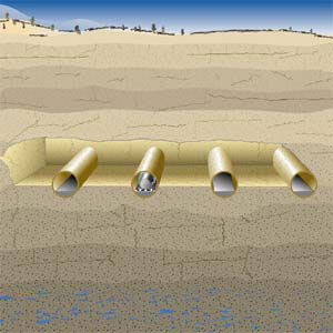 Barrières naturelles pour le concept de stockage Yucca Mountain